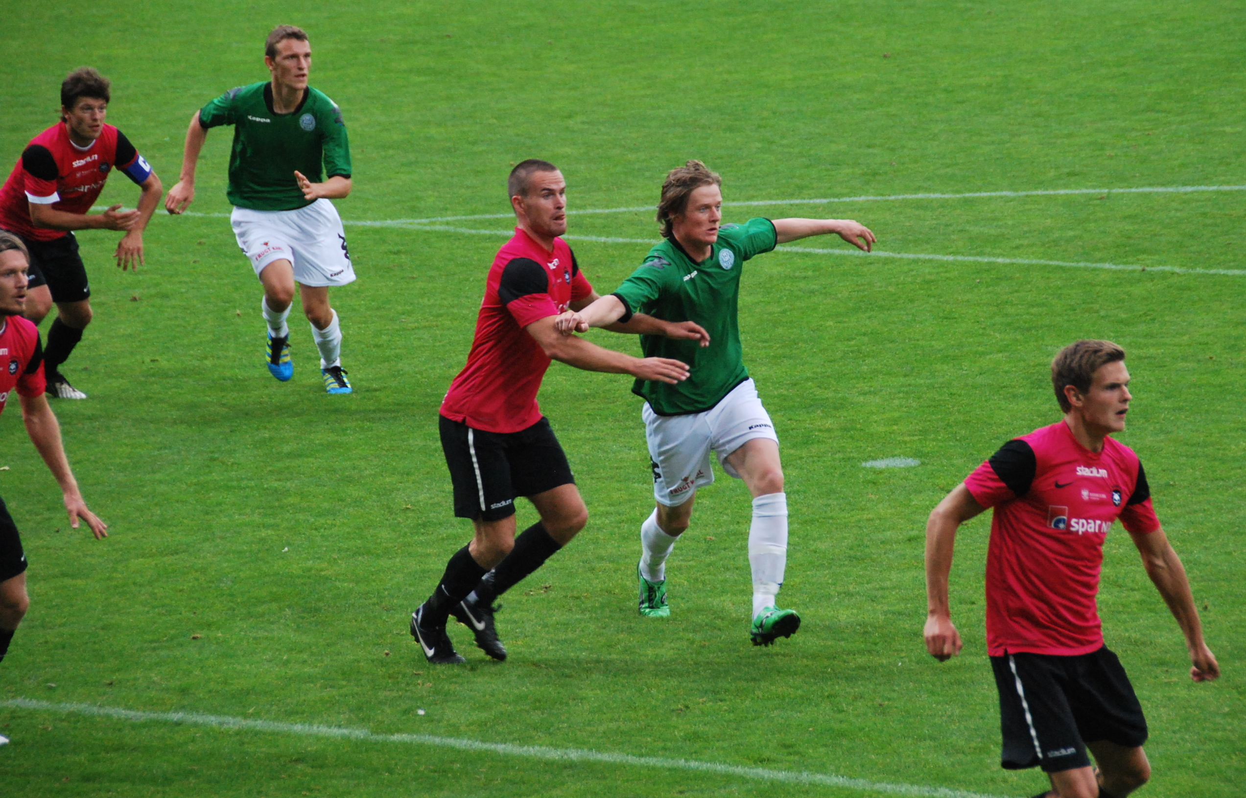 Fodboldspilleren Mads Hvilsom (grøn) fra Viborg FF i nærkamp med Anders Qvist (pink) fra FC Roskilde i 1. divisionskampen på Viborg Stadion.